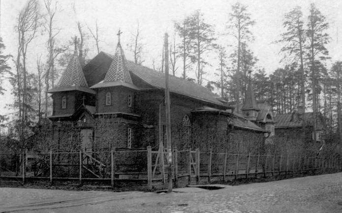 В Лигове